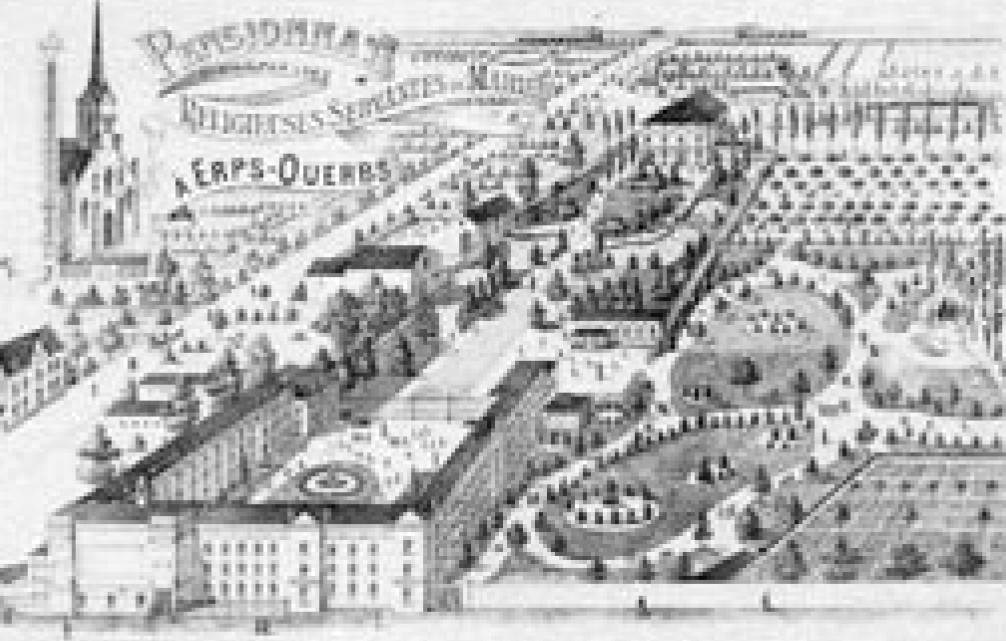 Vrije basisschool Mater Dei (met pensionaat) en klooster Erps-Kwerps rond 1900